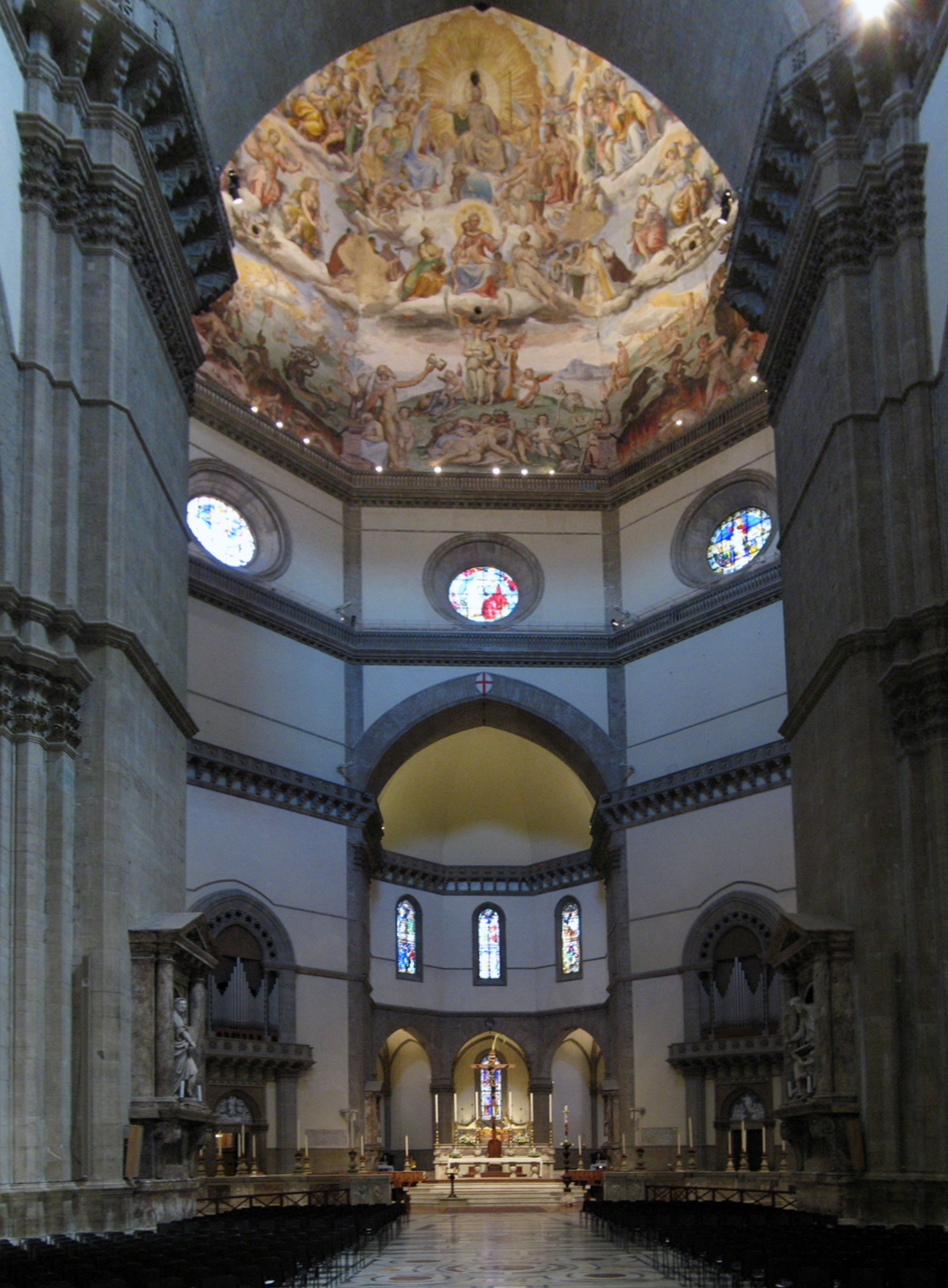 Inside Santa Maria del Fiore (Florence)